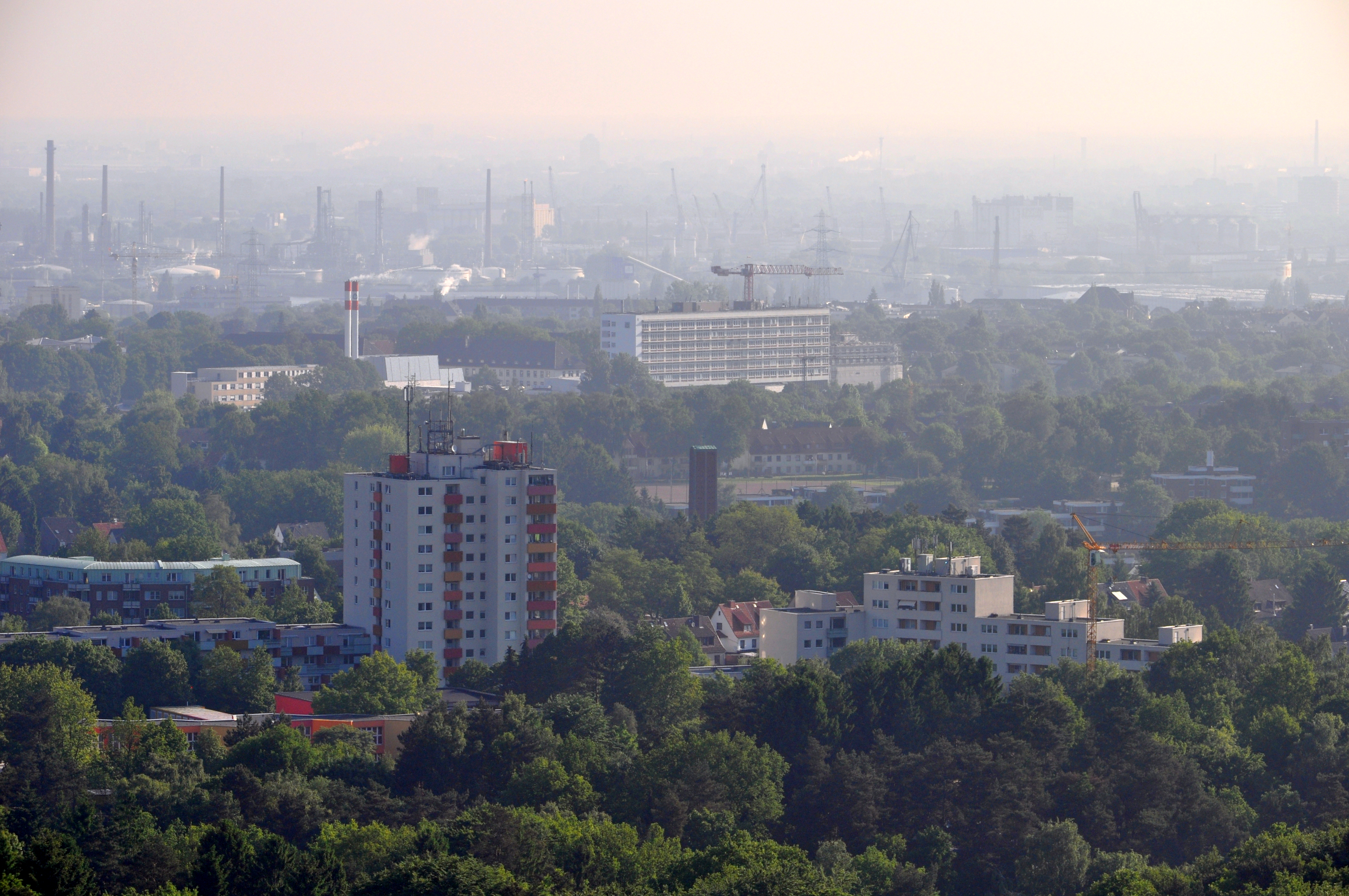 Blick über Hamburg-Eißendorf und Hamburg-Heimfeld, im Hintergrund der Hamburger Hafen.